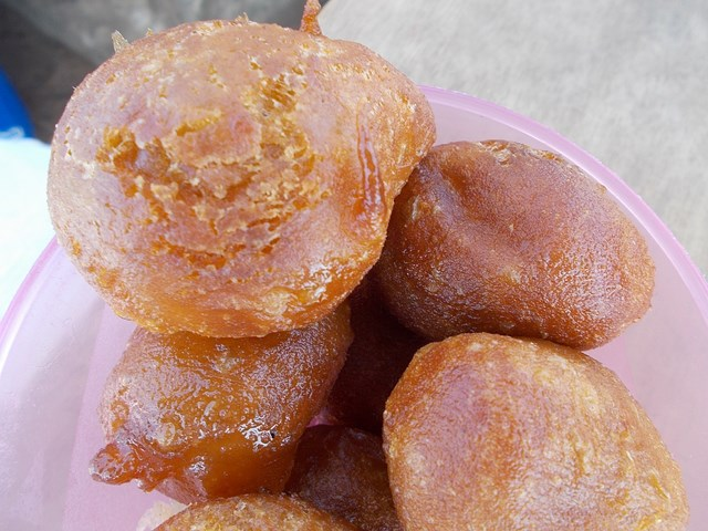 Forme de gateau à base de farine de blé, frit à l'huile This is an image of food from Togo